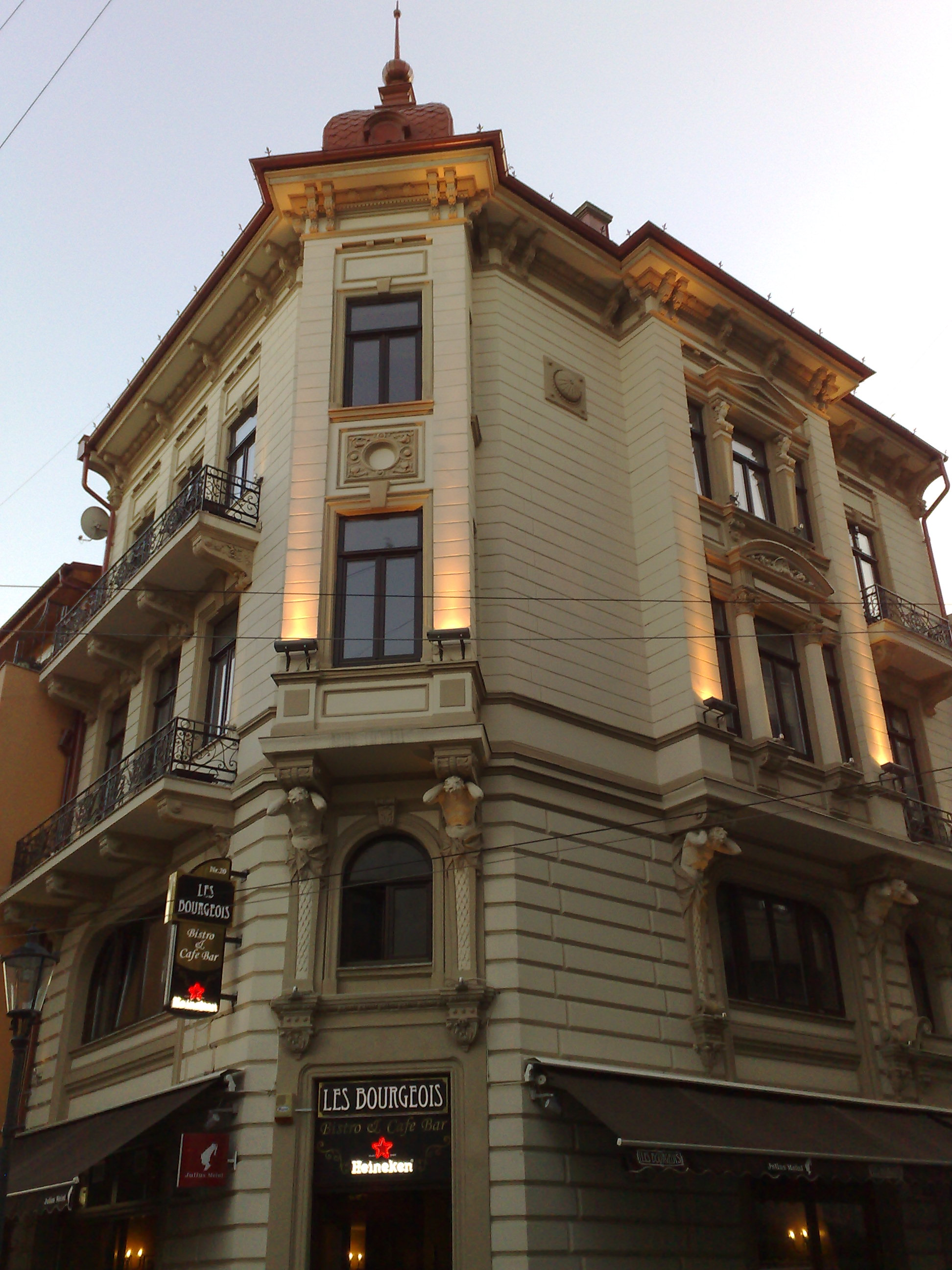 Casa de pe Smardan